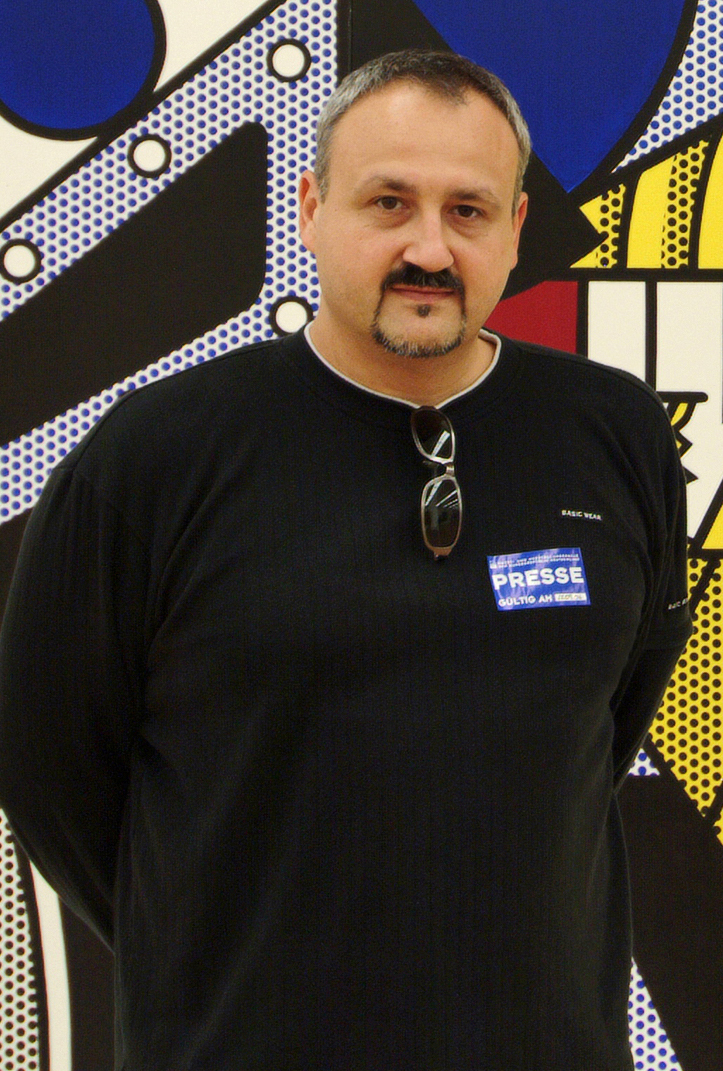 Udo Ungar Portrait in Bonn